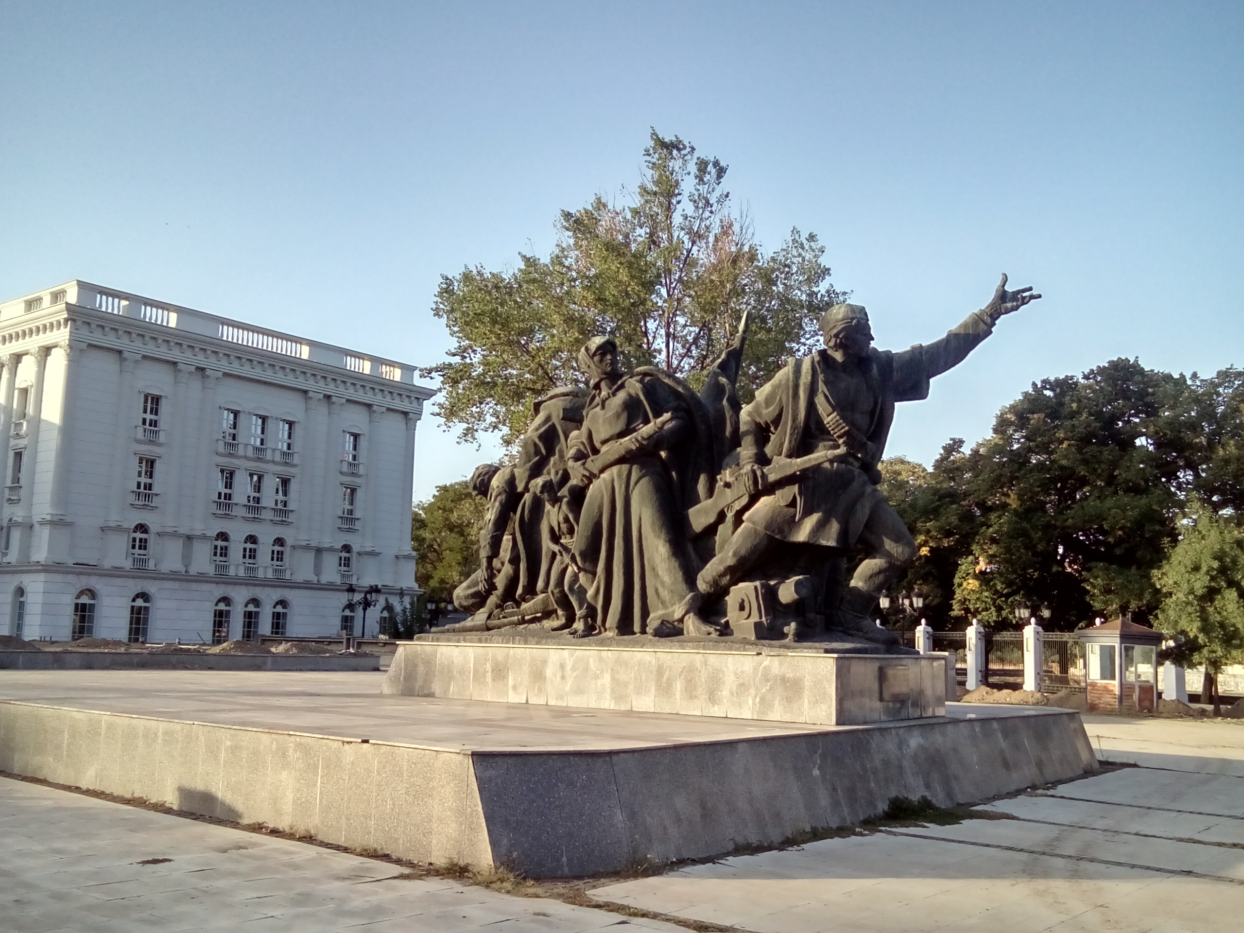 Centar, Skopje 1000, Macedonia (FYROM)